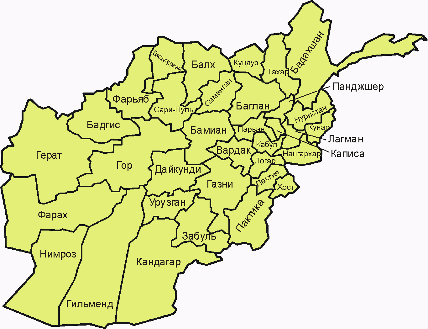 Ирон: Административон дихкæнынад.